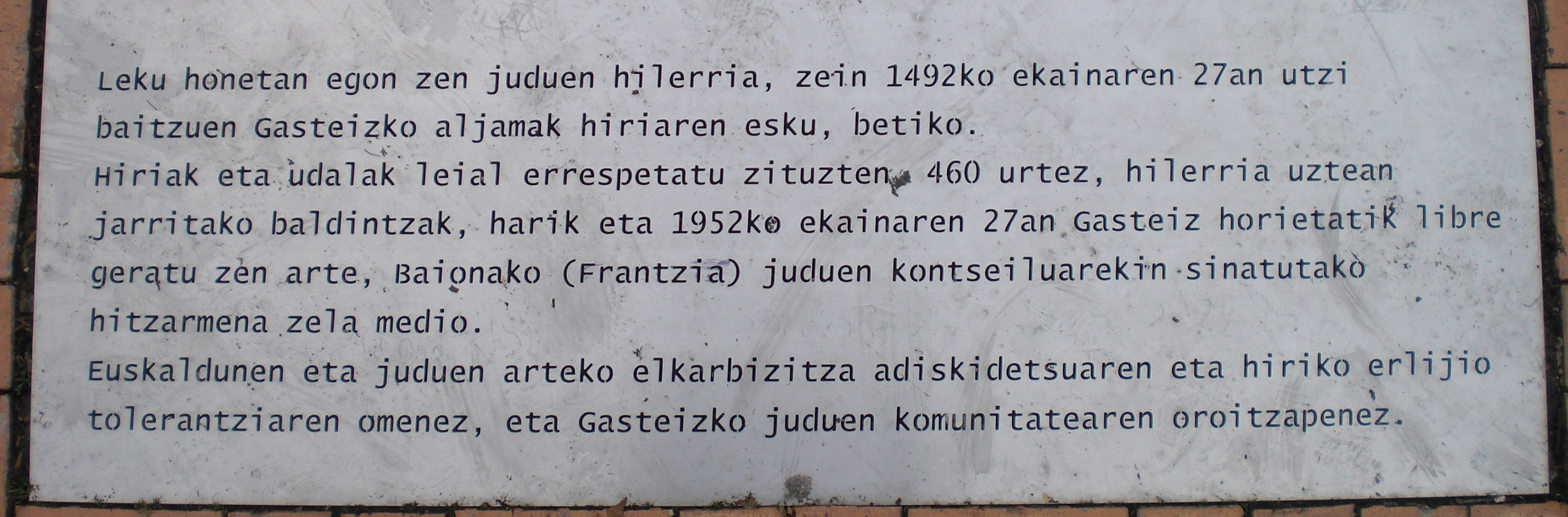 Judimendiko zoruko oroitarria